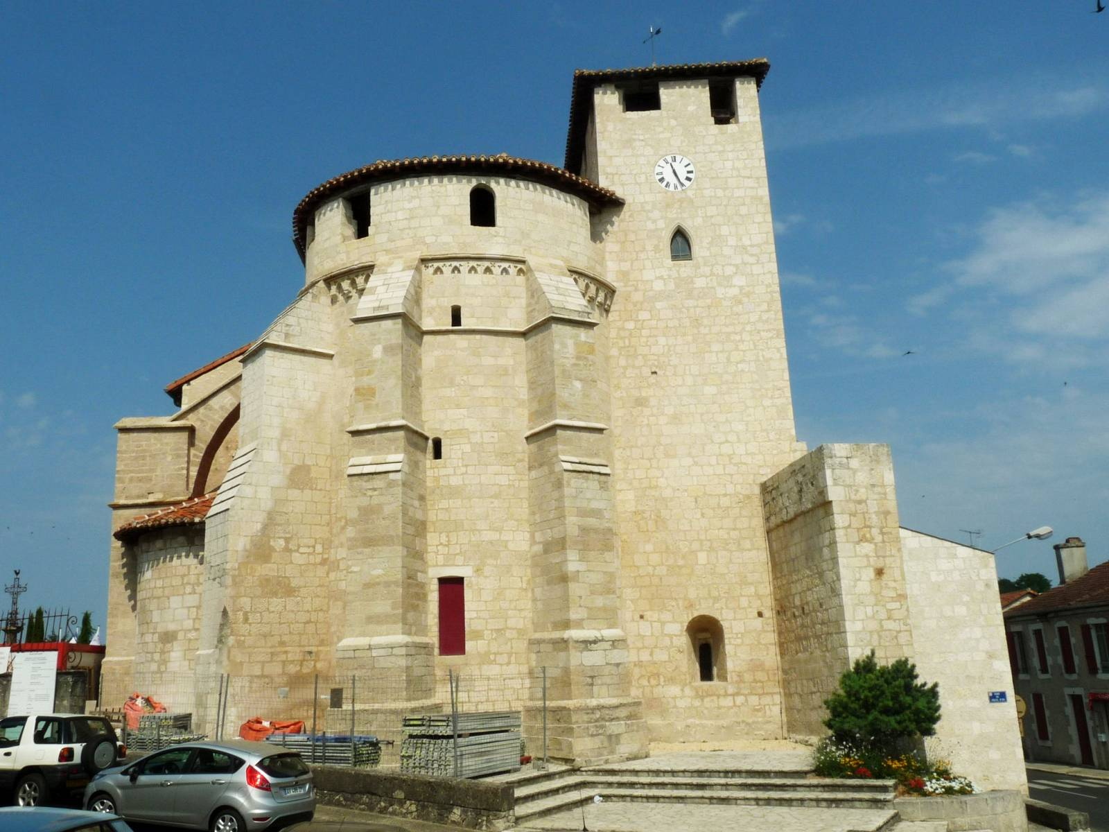 L'église de Roquefort (Landes, France) vue depuis l'hôtel-de-ville